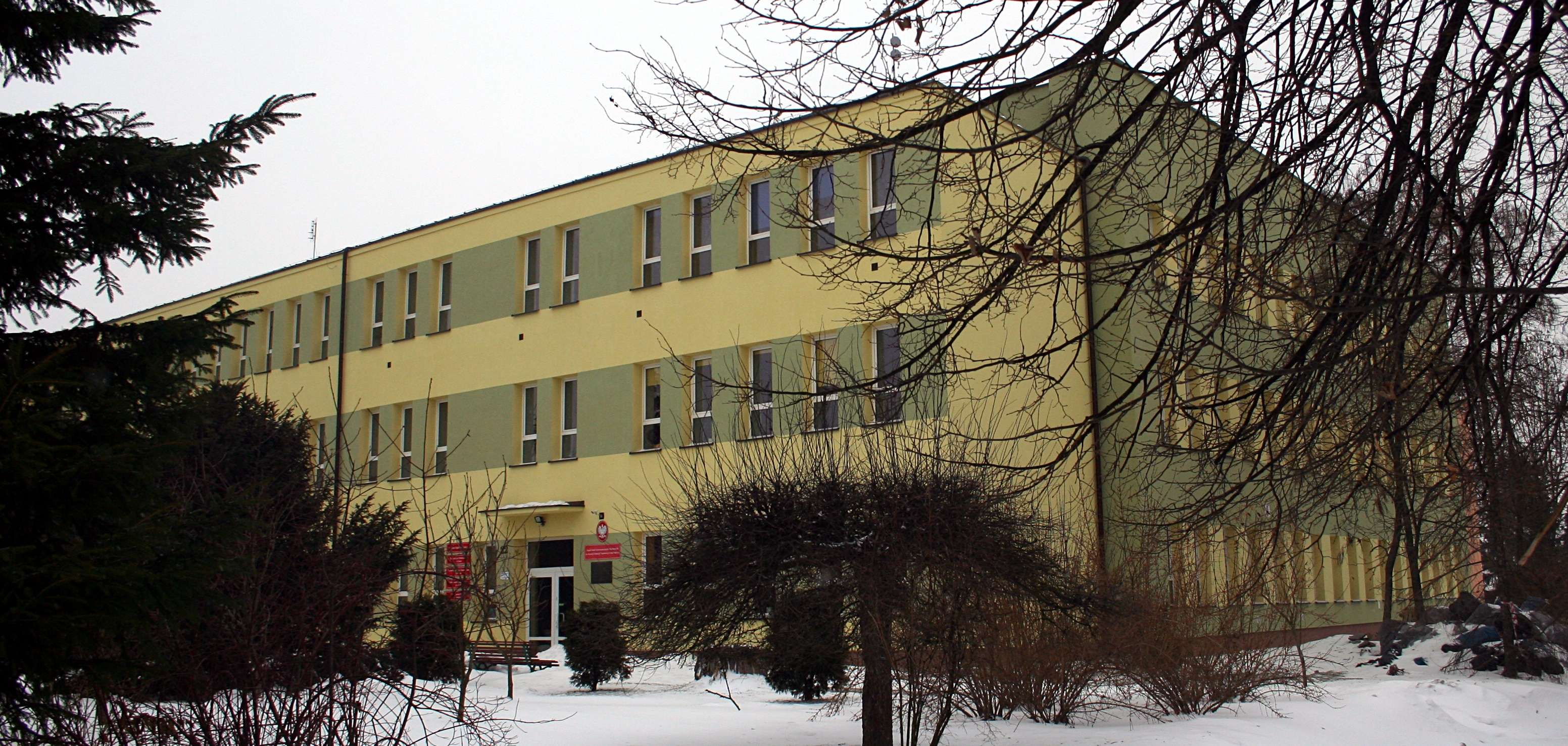 Zespół szkół ponadgimnazjalnych w Sandomierzu